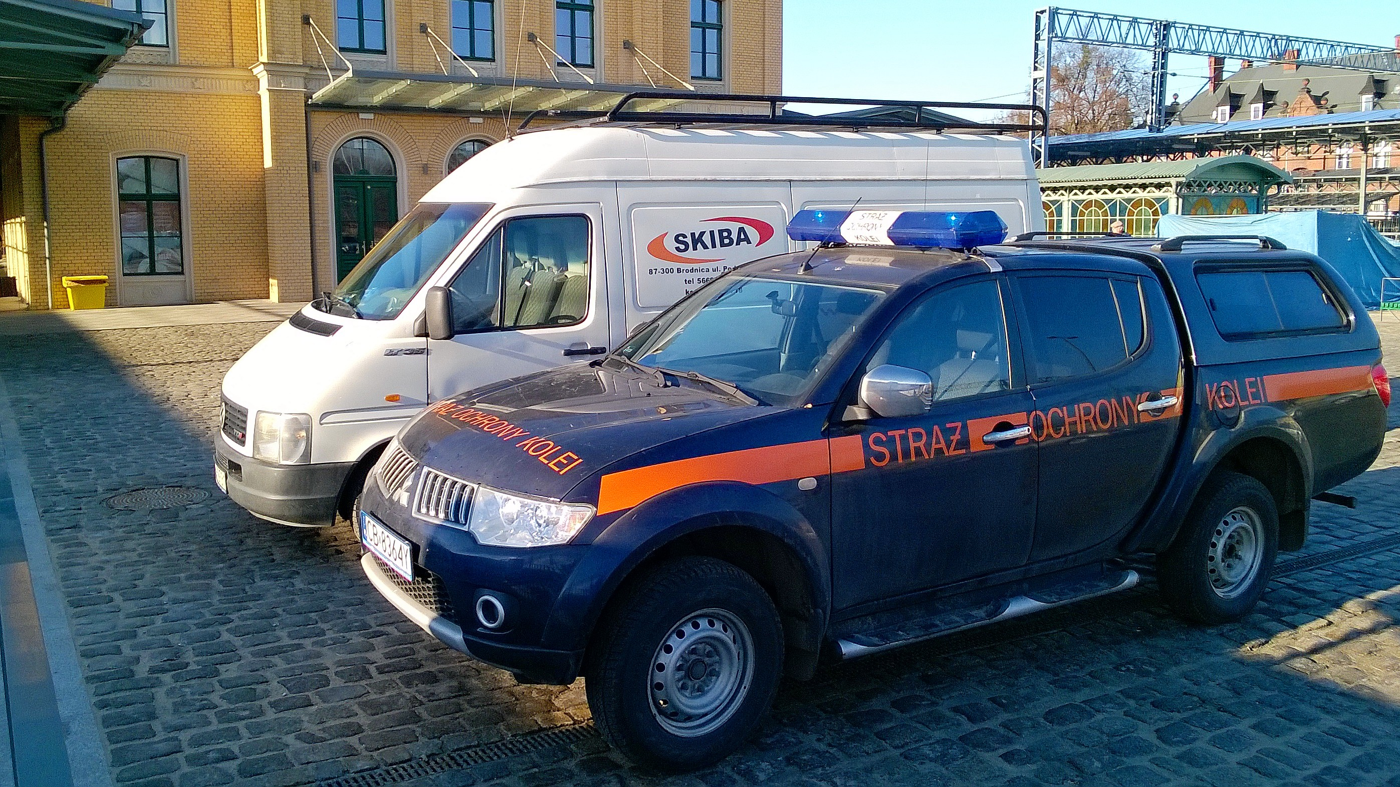 Pojazd Straży Ochrony Kolei w Toruniu